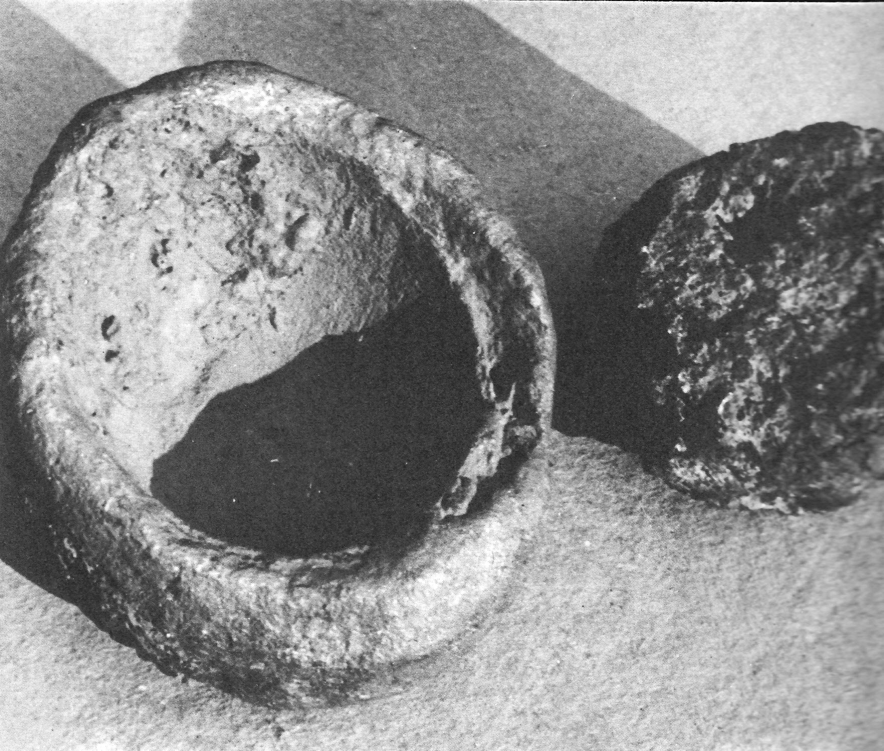 Kokila s kusom železa z laténskej huty pod Novým Smokovcom .